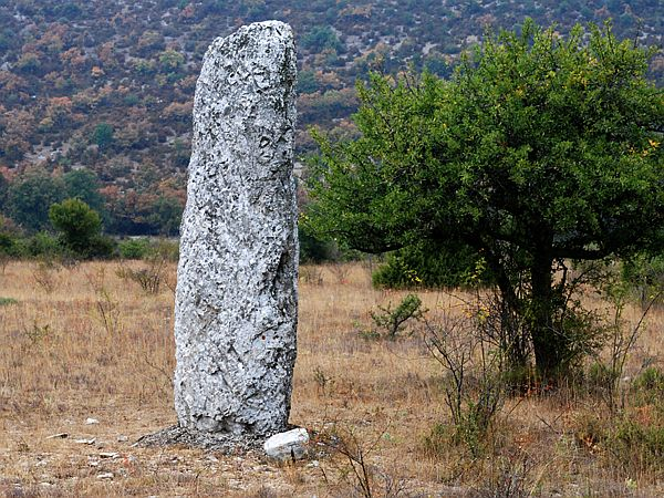 Menhir de la Plaine du Coulet n°2 à La Vacquerie-et-Saint-Martin-de-Castries (34).